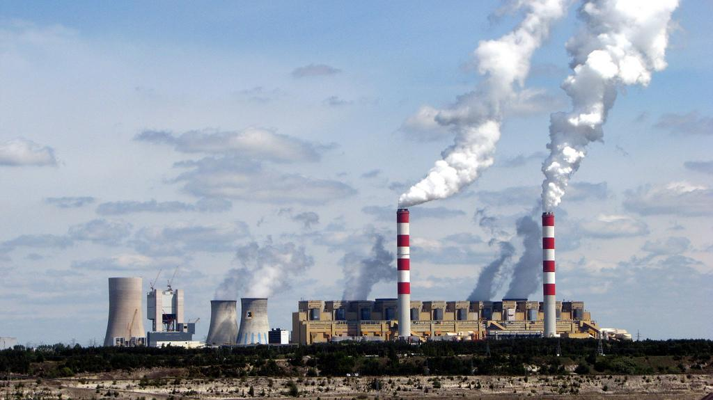 Elektrownia Bełchatów widziana od południa, zza wielkiego dołu odkrywkowego kopalni węgla brunatnego.